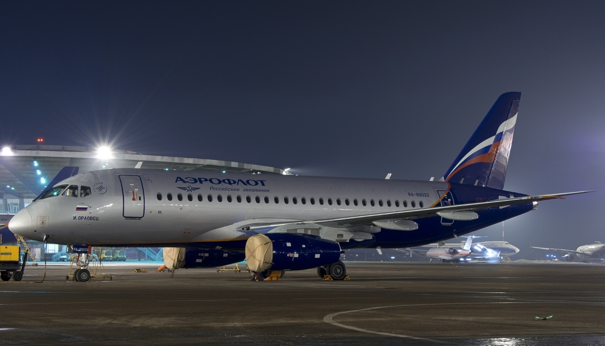 Sukhoi Superjet 100-95 (RA-89022)